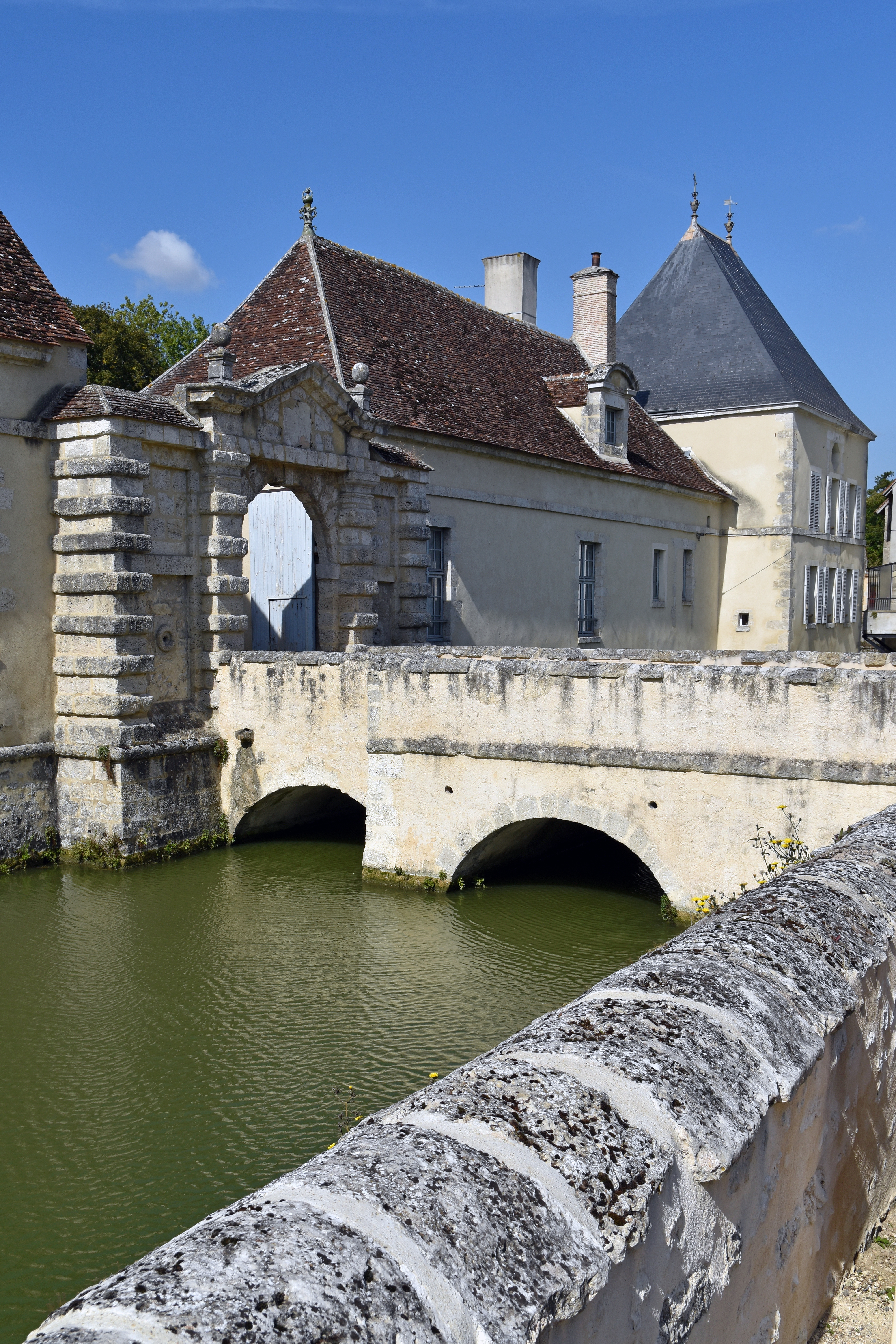 Ancien château de Beaumont du Gâtinais, Seine et Marne, France .